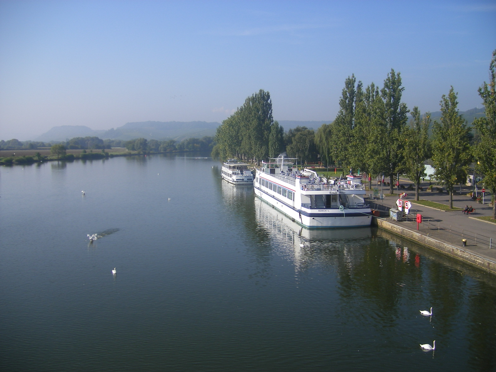 Remich - Moselle River